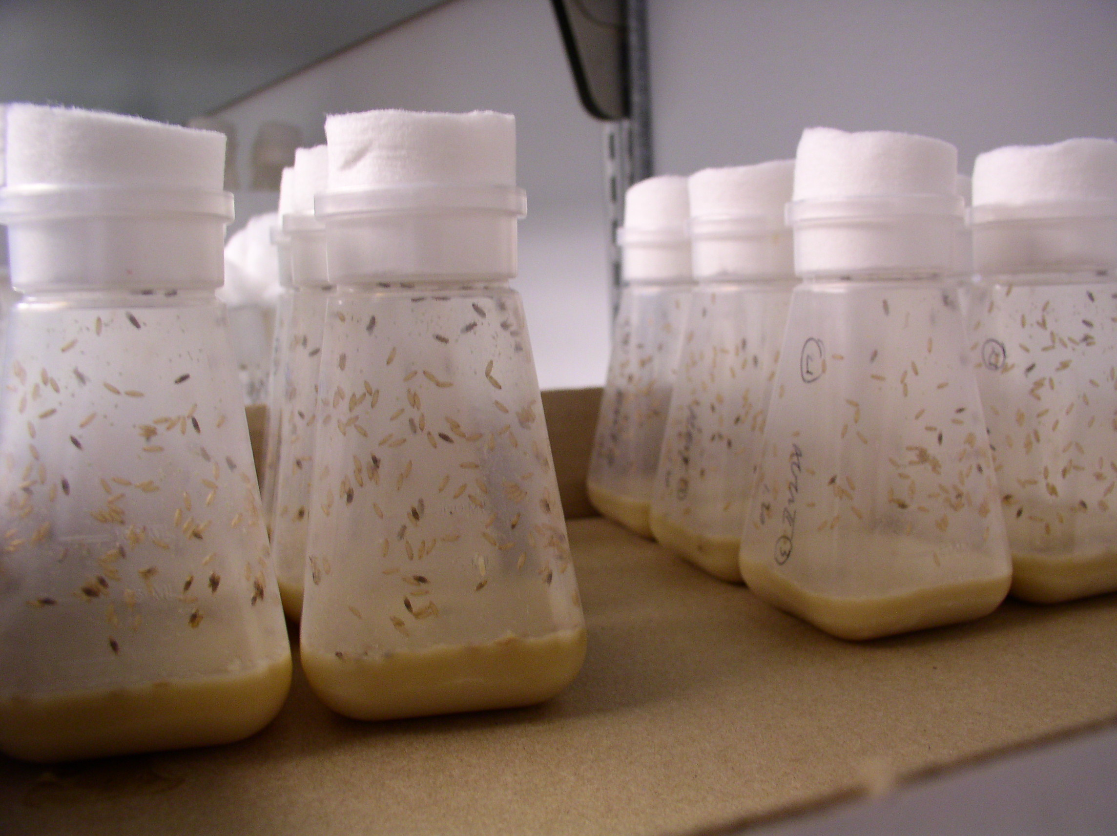 Drosophila larva